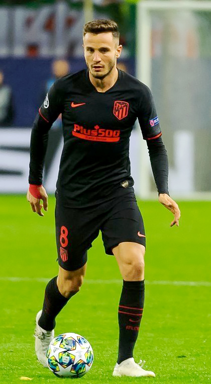 Saúl Ñíguez con la maglia dell'Atlético Madrid nel 2019